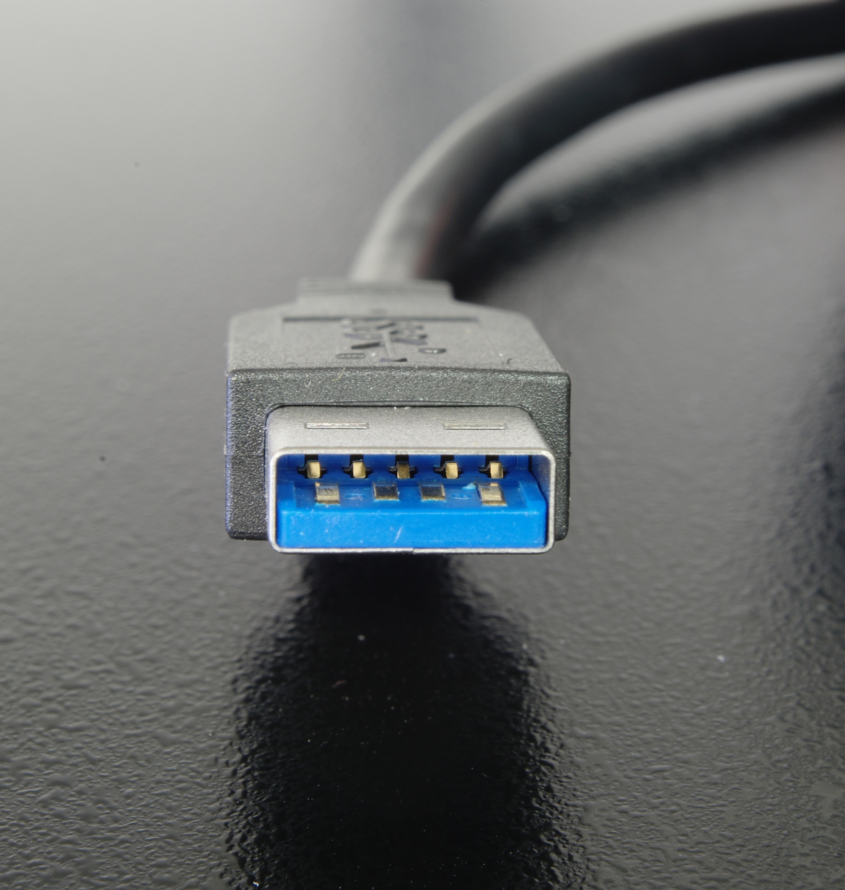 Steckverbindung USB 3.0